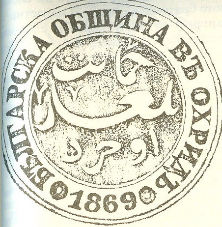 Печат на Охридската българска община